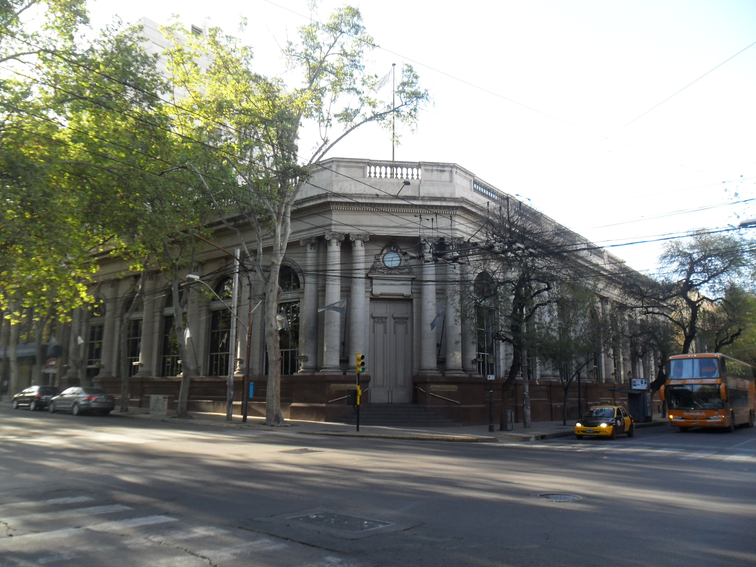 Banco Nación en la Ciudad de Mendoza, calle Necochea y 9 de julio.